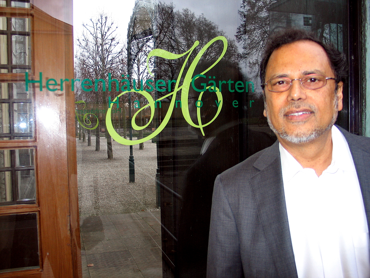 Impressions from the second day of the Herrenhausen Symposium Already Beyond? - 40 Years Limits to Growth, organized by the VolkswagenStiftung in the Gallery building of Herrenhausen Gardens in Hanover.